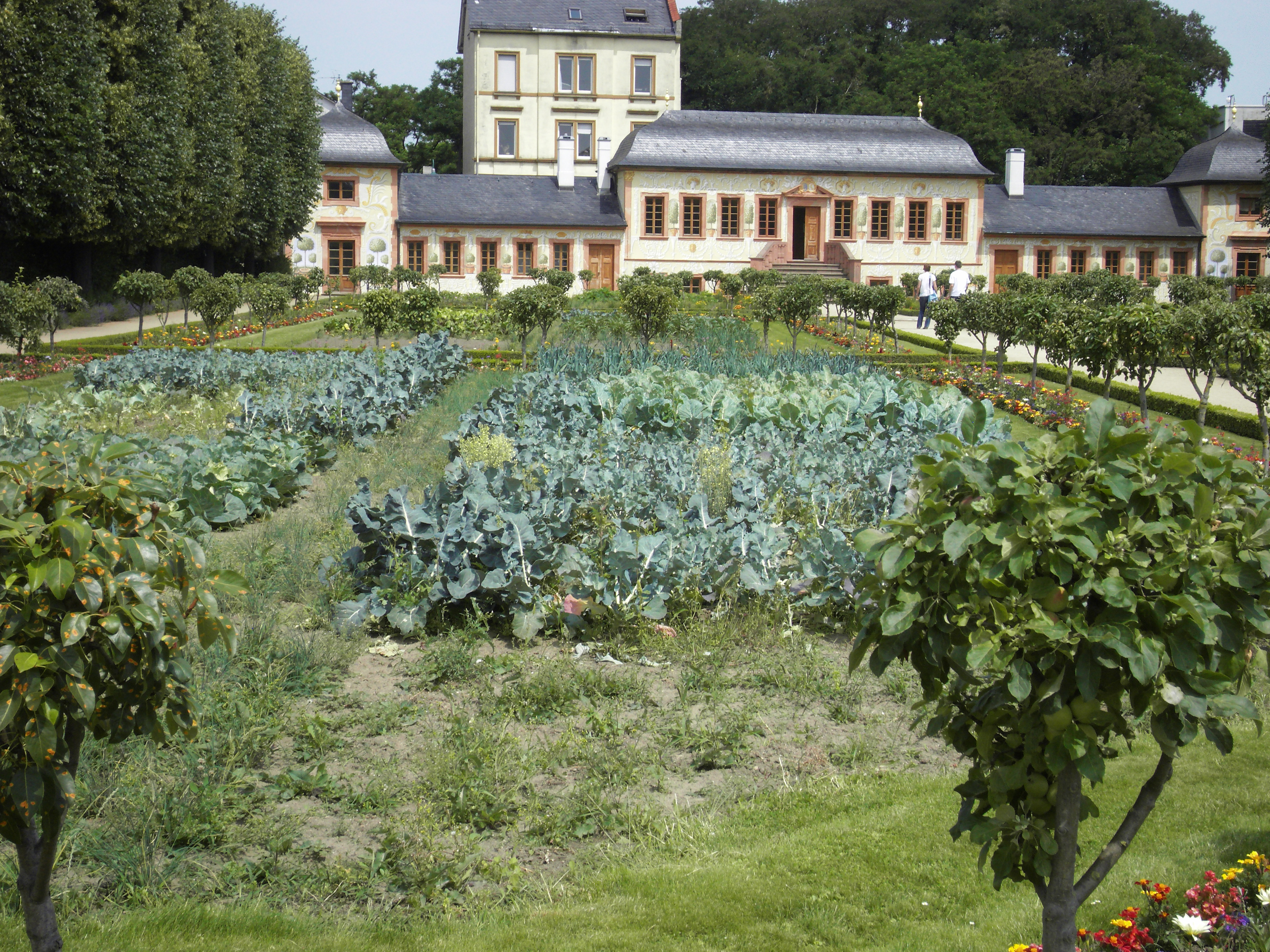 Gemüsegarten im Park Prinz Georg Garten Darmstadt